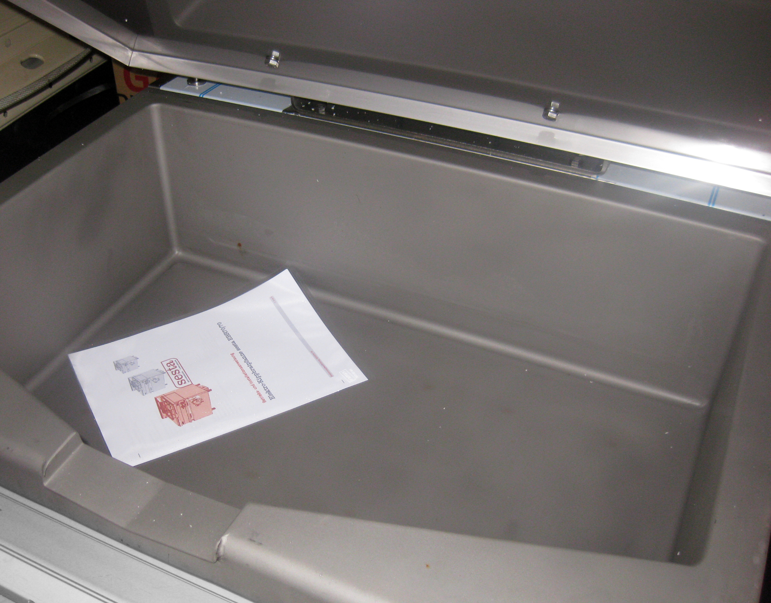 Kippbratpfanne von sesta